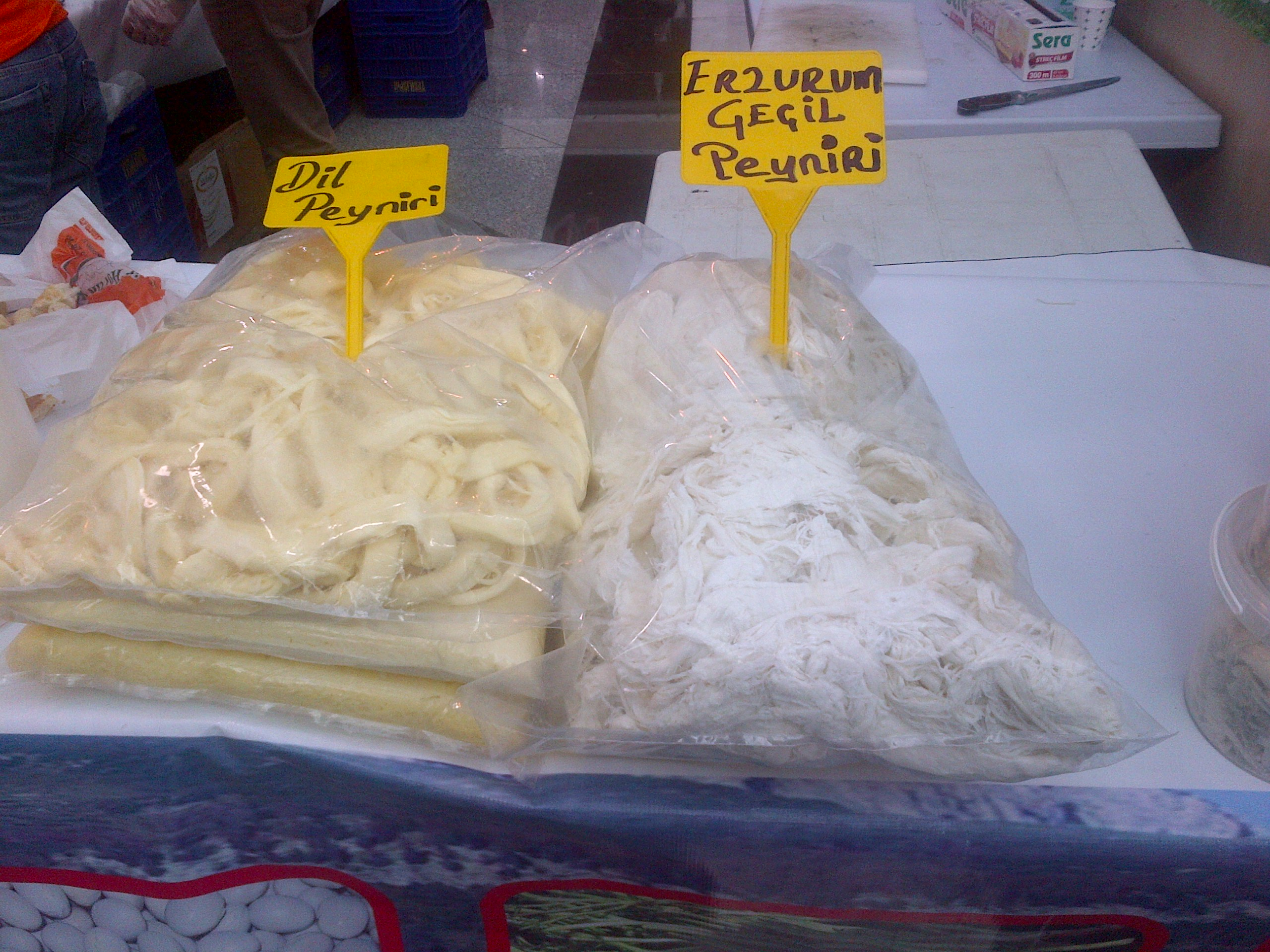 Dil peyniri ve Civil peyniri (Quesos turcos "Dil" and "Civil")